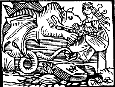 Hie legt der Trach seyn haupt in der Junckfrawen schoß, als er sie auff den stain het bracht, vnd ruet.